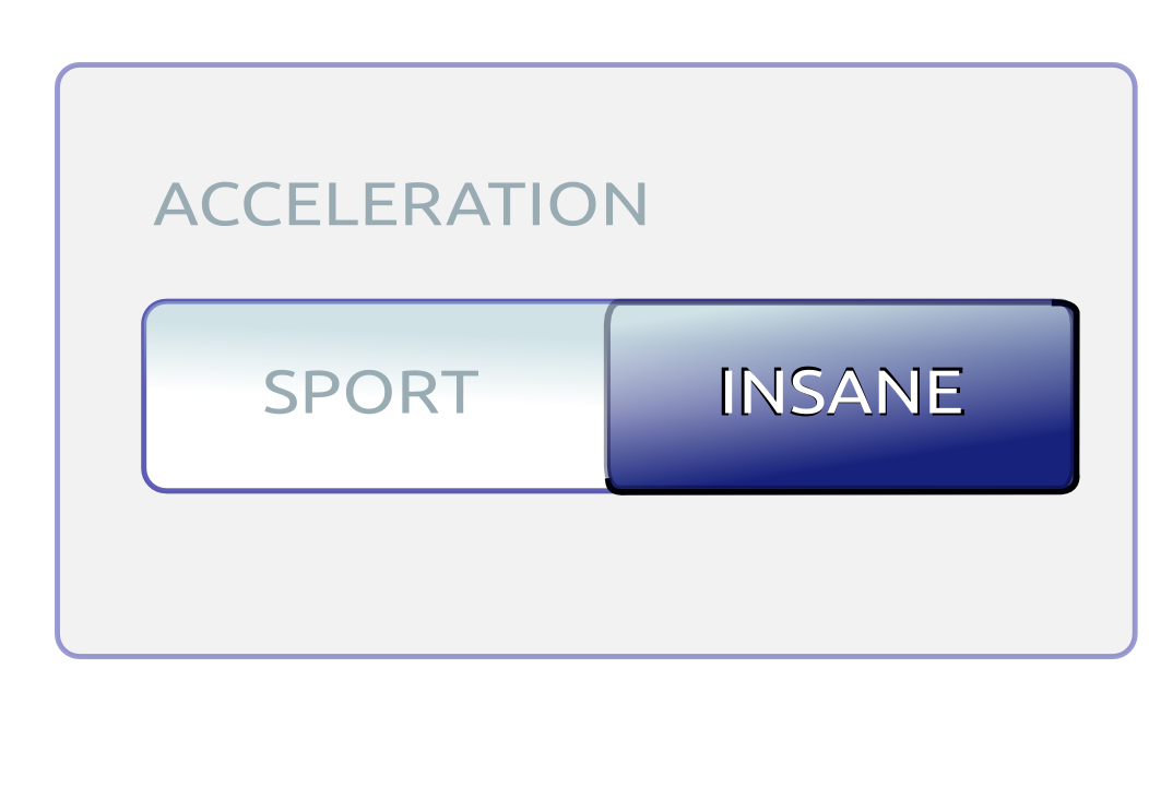 Botón virtual en la pantalla de un Tesla Model S P85D que presenta los modos de aceleración Sport (deportivo) e Insane (loco).